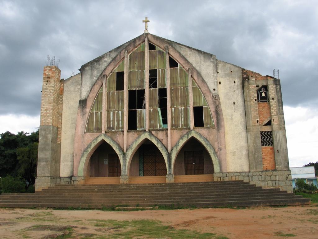 Katholisches Kirchengebäude in Huambo, Angola